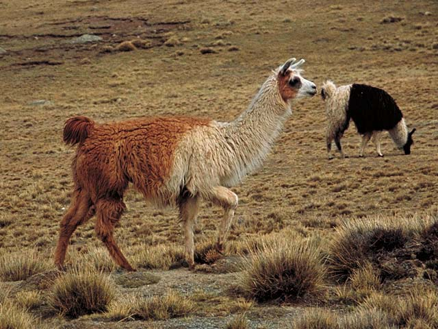 Llama en La Paz de Bolivia, deciembre de 2001. foto por usario Inti-sol simismo. リャマ 2001年12月、ボリビア・ラパス郊外で投稿者が撮影。